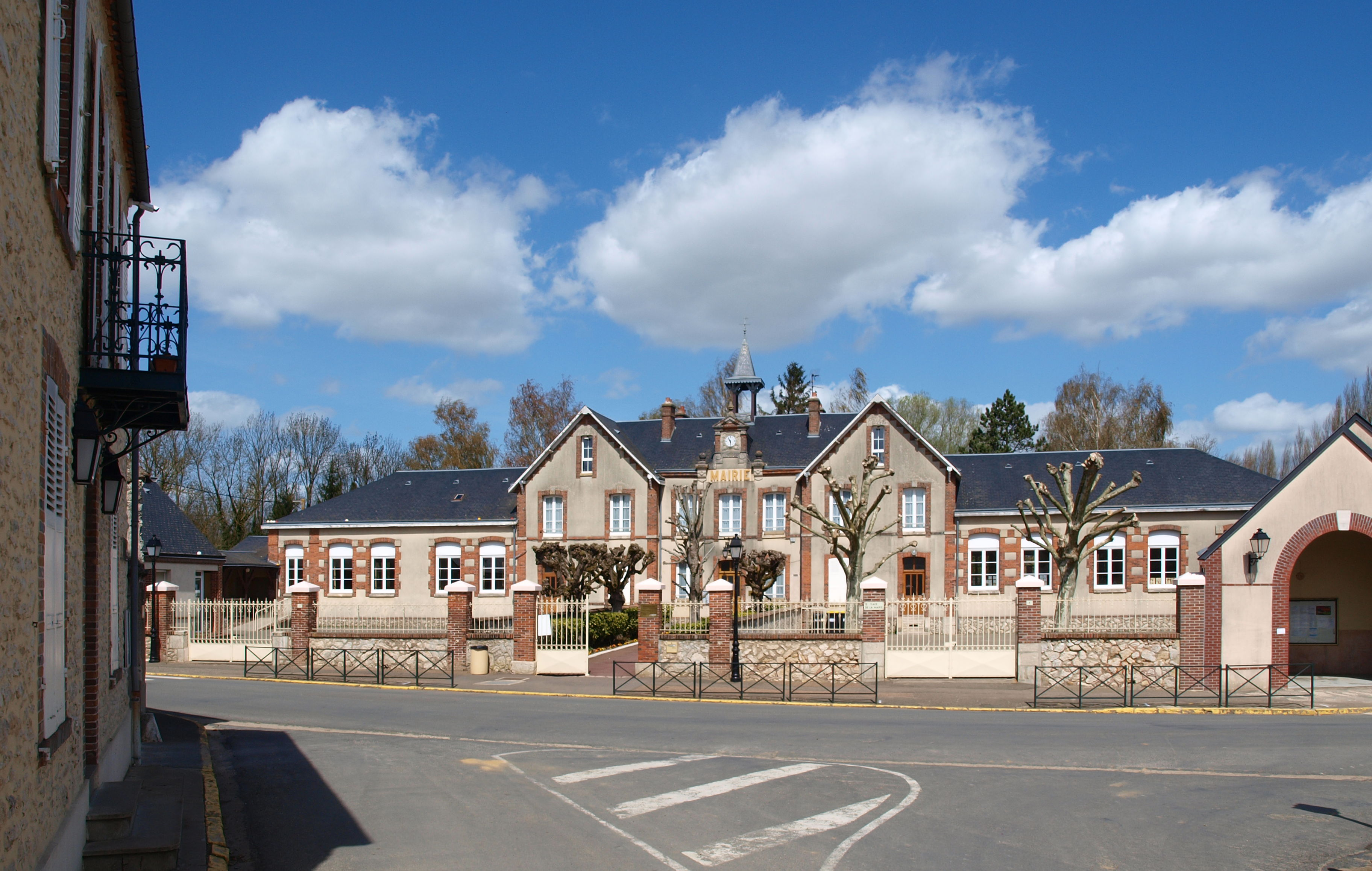 Aunay-sous-Auneau (Eure-et-Loir , France) , mairie-école.